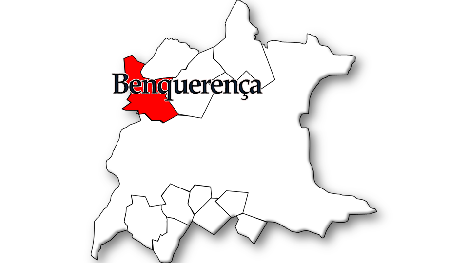 População